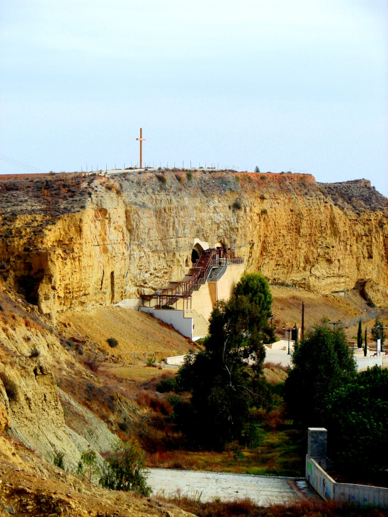 a@a Panagia Chrisospiliotissa deftera village nicosia cy